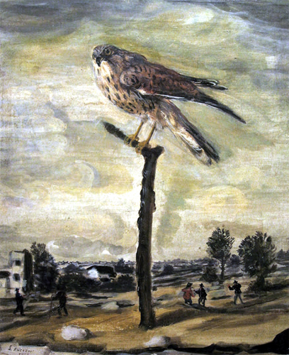 Luigi Zuccheri (1904 - 1974) "Falchetto su ramo e piccoli uomini"" Tempera su tela